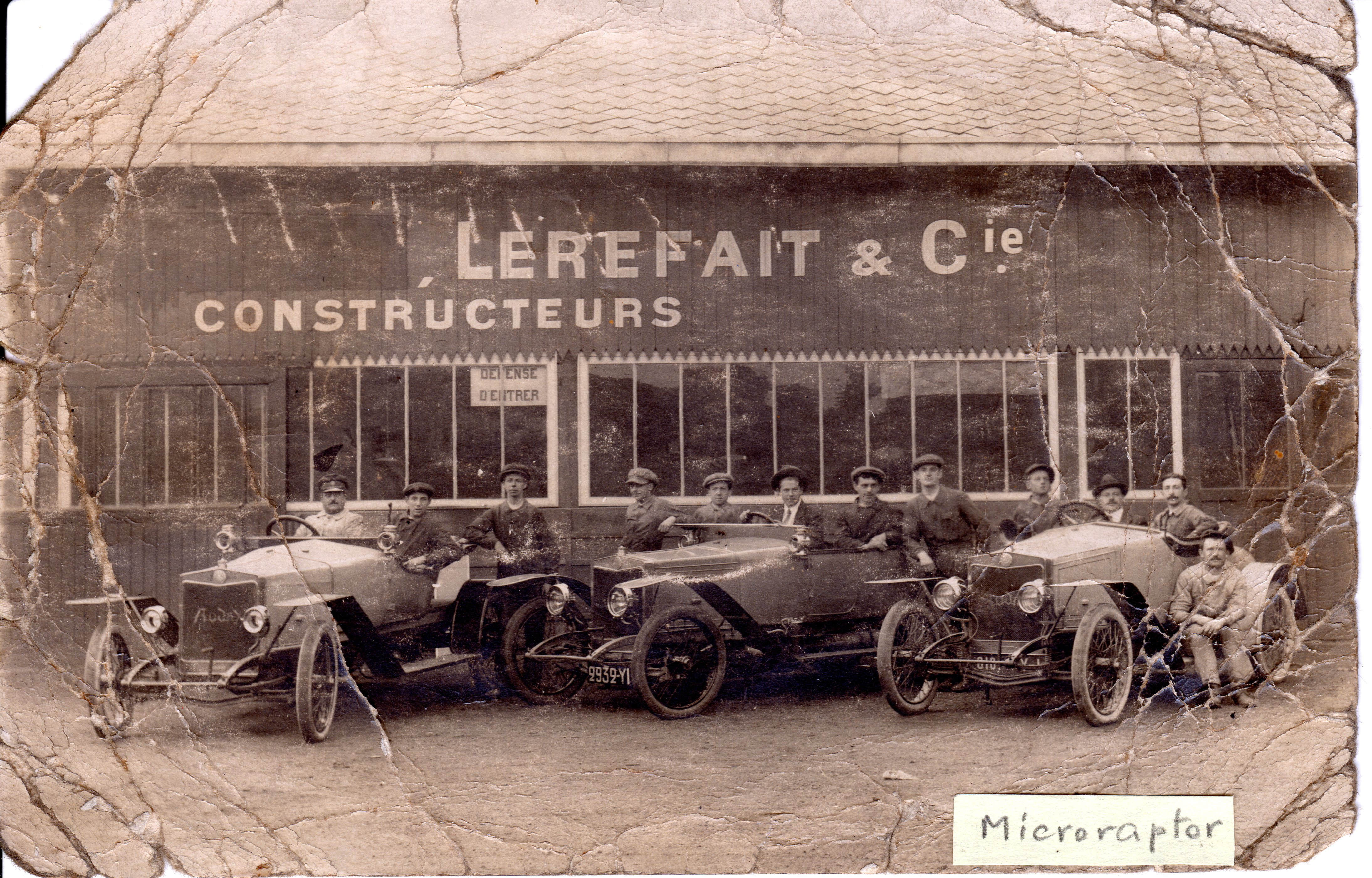 Autos Audax et atelier Bournhouet, Lerefait et Cie